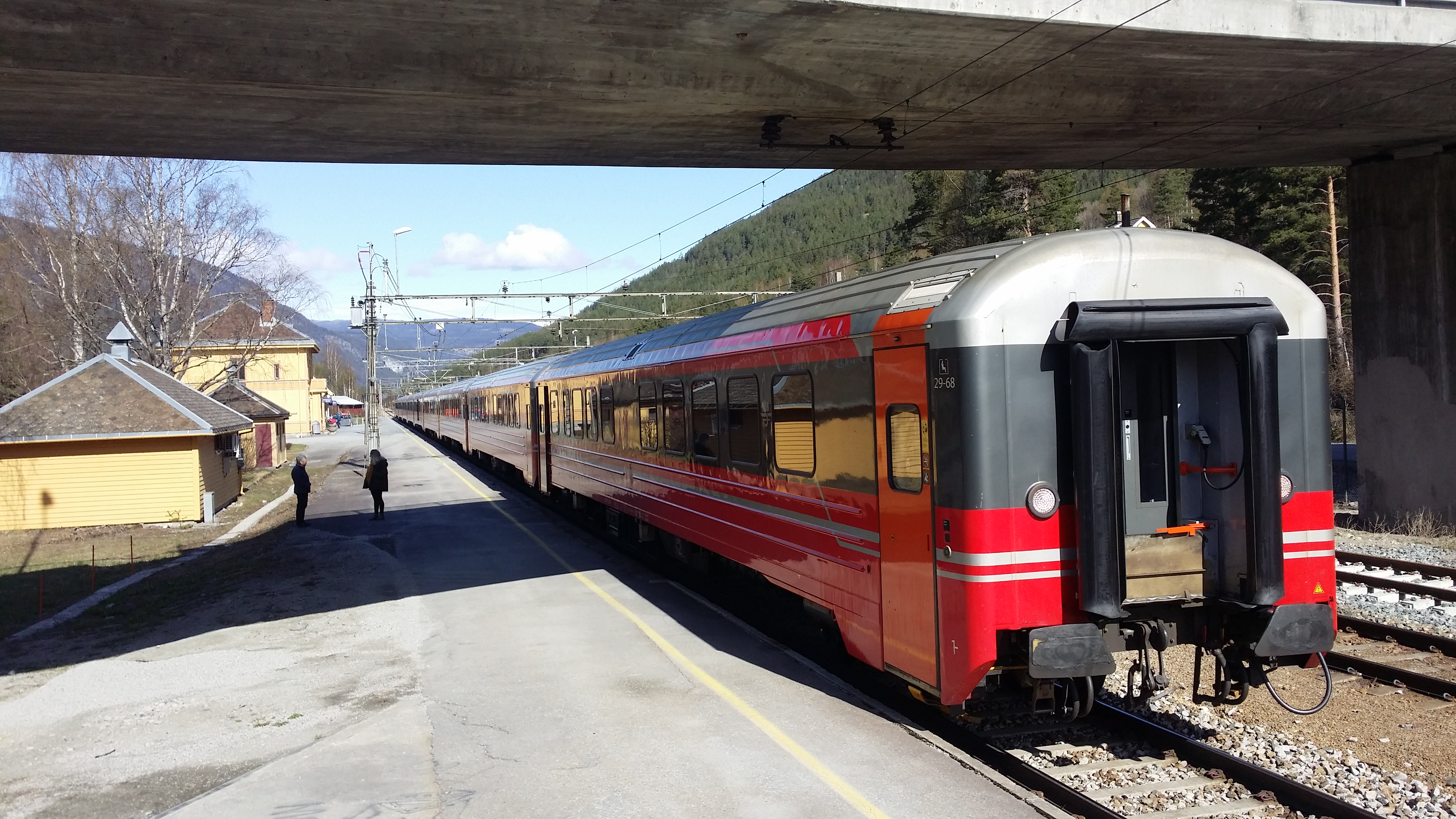 Nesbyen stasjon med persontog til Bergen.